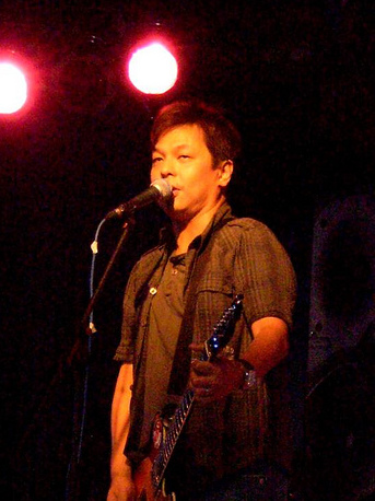 Filipino musician, Jett Pangan